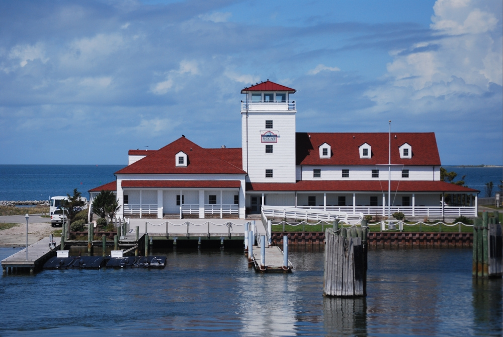 ocracoke 13